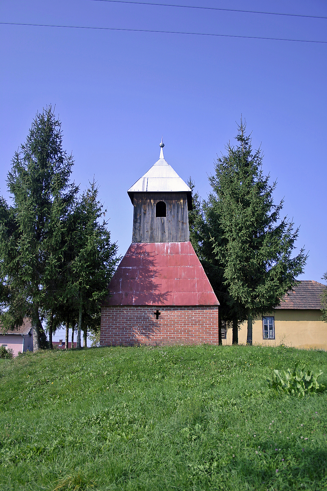 Vaški zvonik v Šalovcih. 19. stoletje.